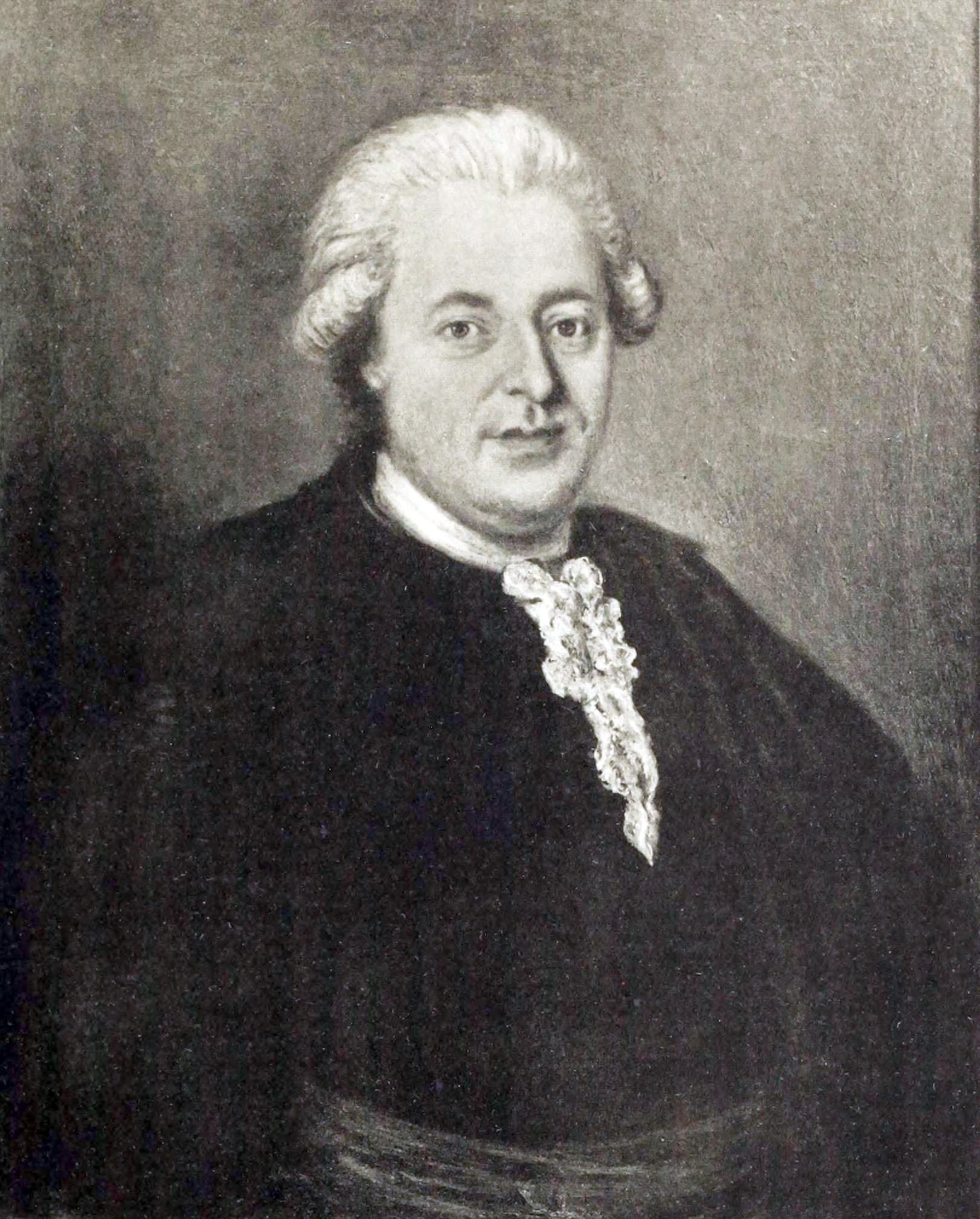 Christian Wollin (1731-1798). Något äldre man, midjebild, fas t. v., med blå ögon, mörkt askfärgade ögonbryn, hvit uppkammad piskperuk med en kanonlock vid örat. Hvit lindad halsduk, spetskrås. Svarta svenska dräkten med liten uppstående krage, rocken knäppt nedtill, rödt skärp, kappa med nedliggande krage öfver ryggen och venstra axeln. Gråblå bakgrund. — På baksidan står: Christian Wollin Primus ad Academiam Lundensem Chemiæ Professor. Mart. Dav. Roth. Pinx. Olja på duk, 78 x 63V2 ctm., af Martin David Roth. Lunds universitet.